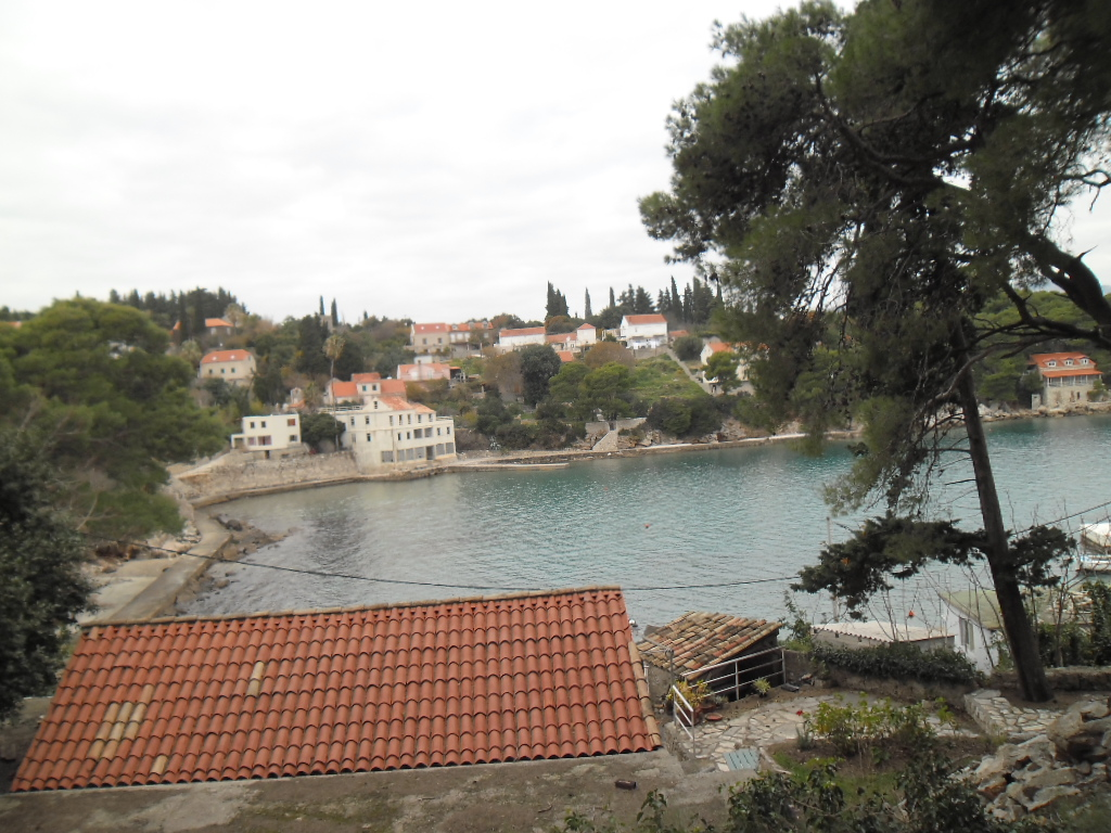 prizor s otoka Koločepa